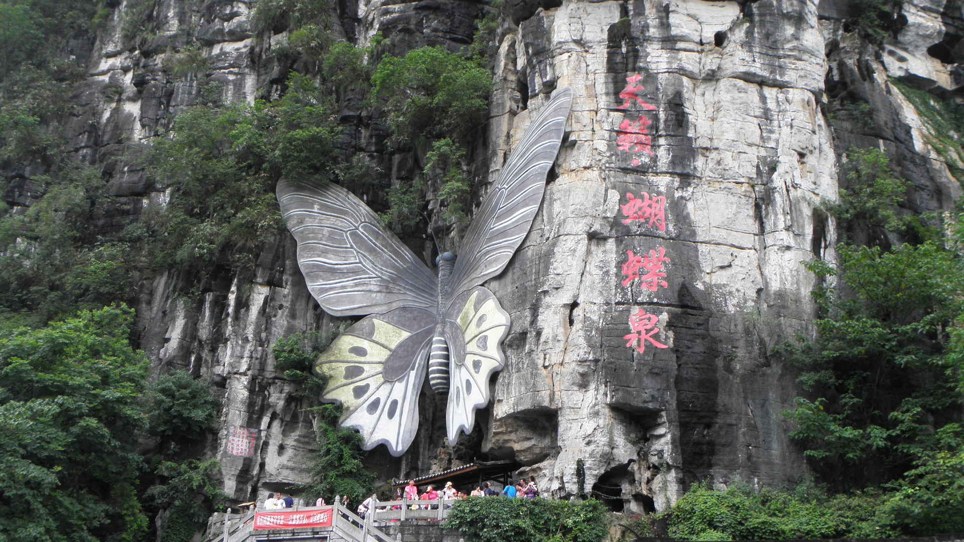 蝴蝶泉